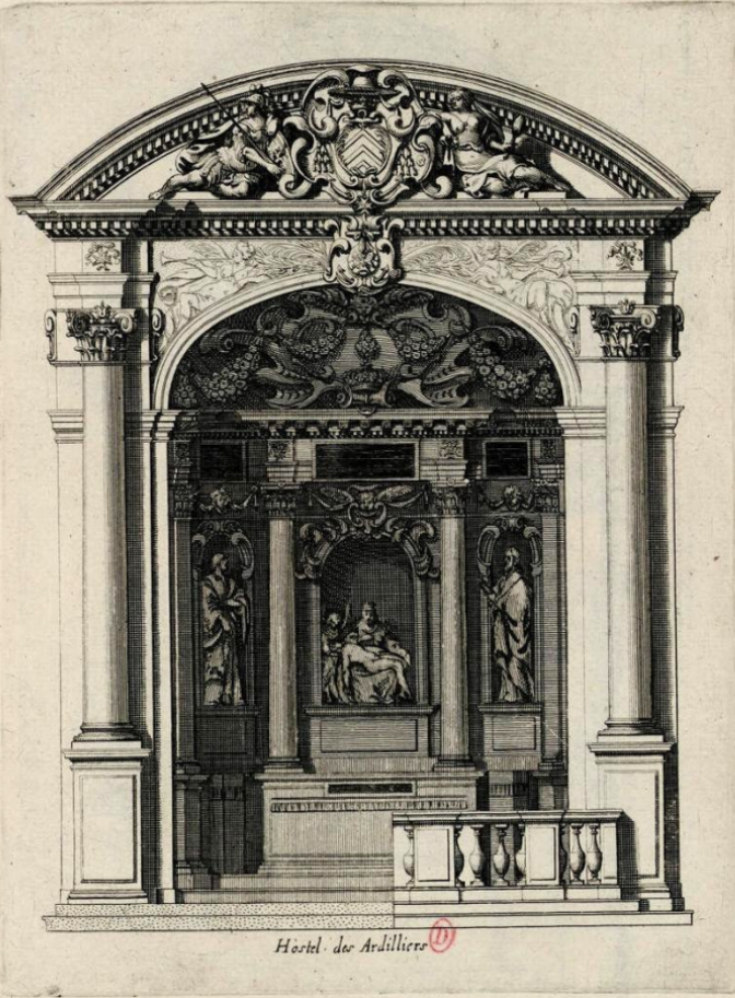 Autel des Ardillers, planche d'Abraham Bosse tirée du Livre d'Architecture d'autels et de cheminées de Jean Barbet